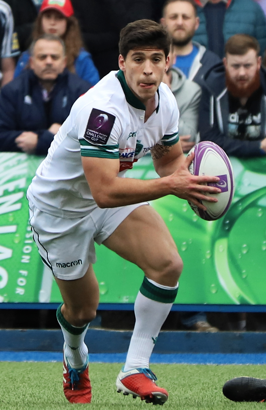 Thibault Daubagna lors du match de demie-finale de Challenge-Cup 2018 Section-Paloise vs Cardiff-Blues